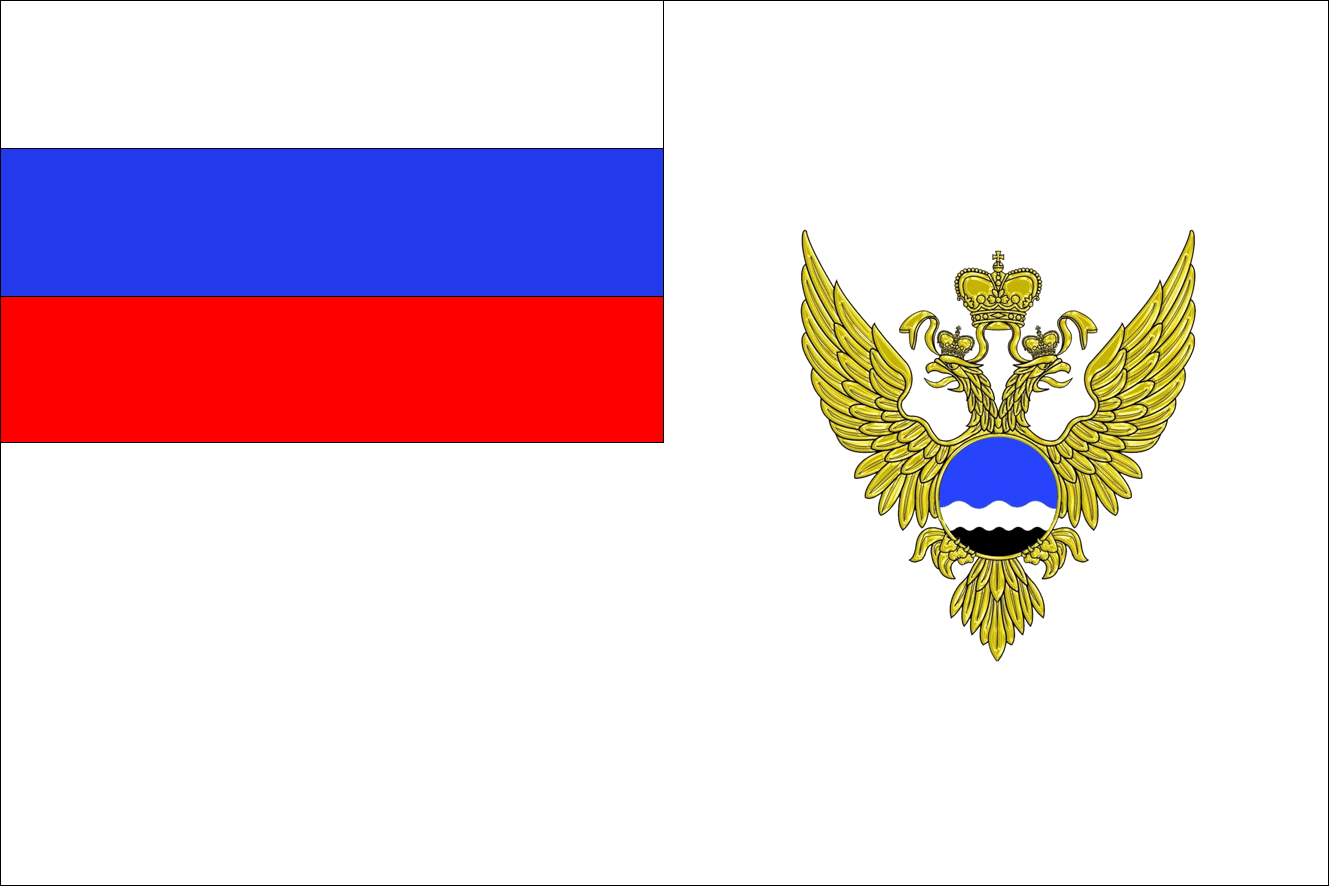 Флаг Федеральной службы по гидрометеорологии и мониторингу окружающей среды (Росгидромет) “Флаг Федеральной службы по гидрометеорологии и мониторингу окружающей среды представляет собой белое прямоугольное полотнище с Государственным флагом Российской Федерации в крыже. В правой половине полотнища располагается эмблема Федеральной службы по гидрометеорологии и мониторингу окружающей среды. Отношение ширины флага к его длине — один к полутора. Отношение площади крыжа к площади флага — один к четырём. Отношение высоты эмблемы к ширине флага — один к двум.”